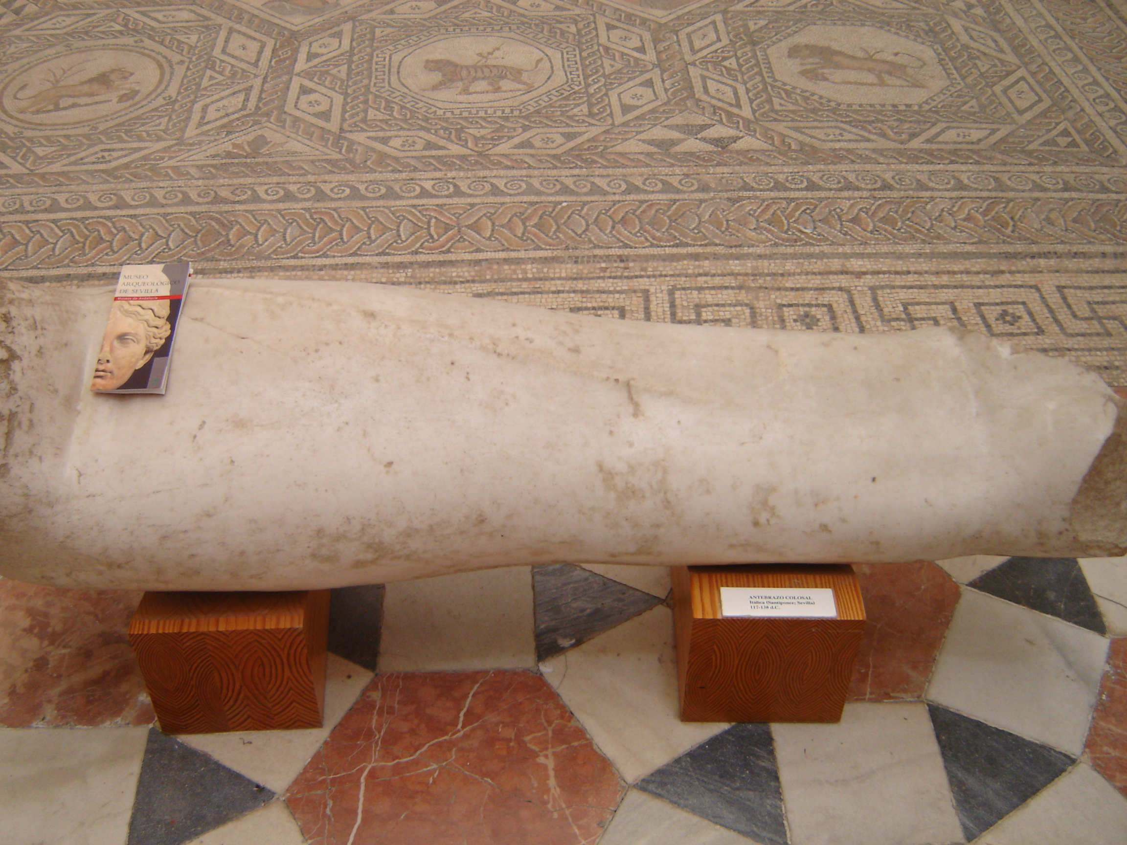 Museo Arqueológico (Plaza de América), en el Parque de María Luisa (Sevilla). Antebrazo colosal (folleto mide 21 cm. Año 117-138. Itálica (Sevilla). Realización propia.